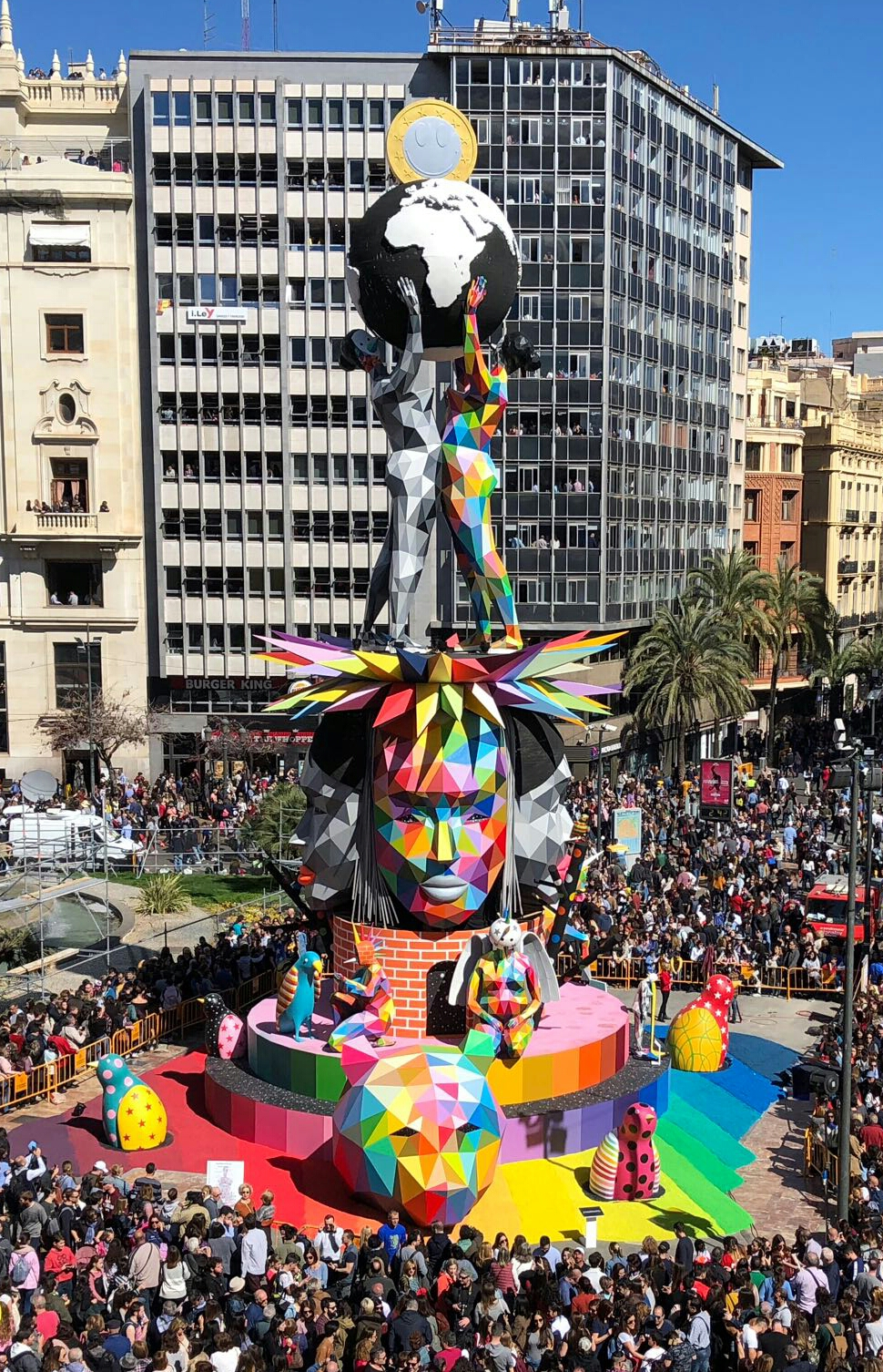 Okuda San MIguel. Falla del Ayuntamiento de Valencia 2018.